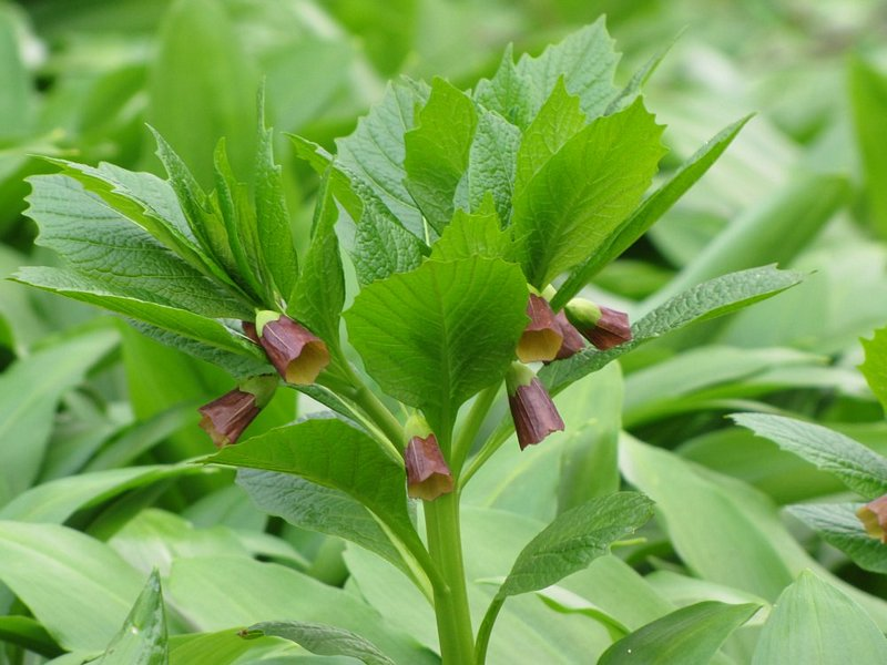 Kranjski volčič ali bunika (Scopolia carniolica)